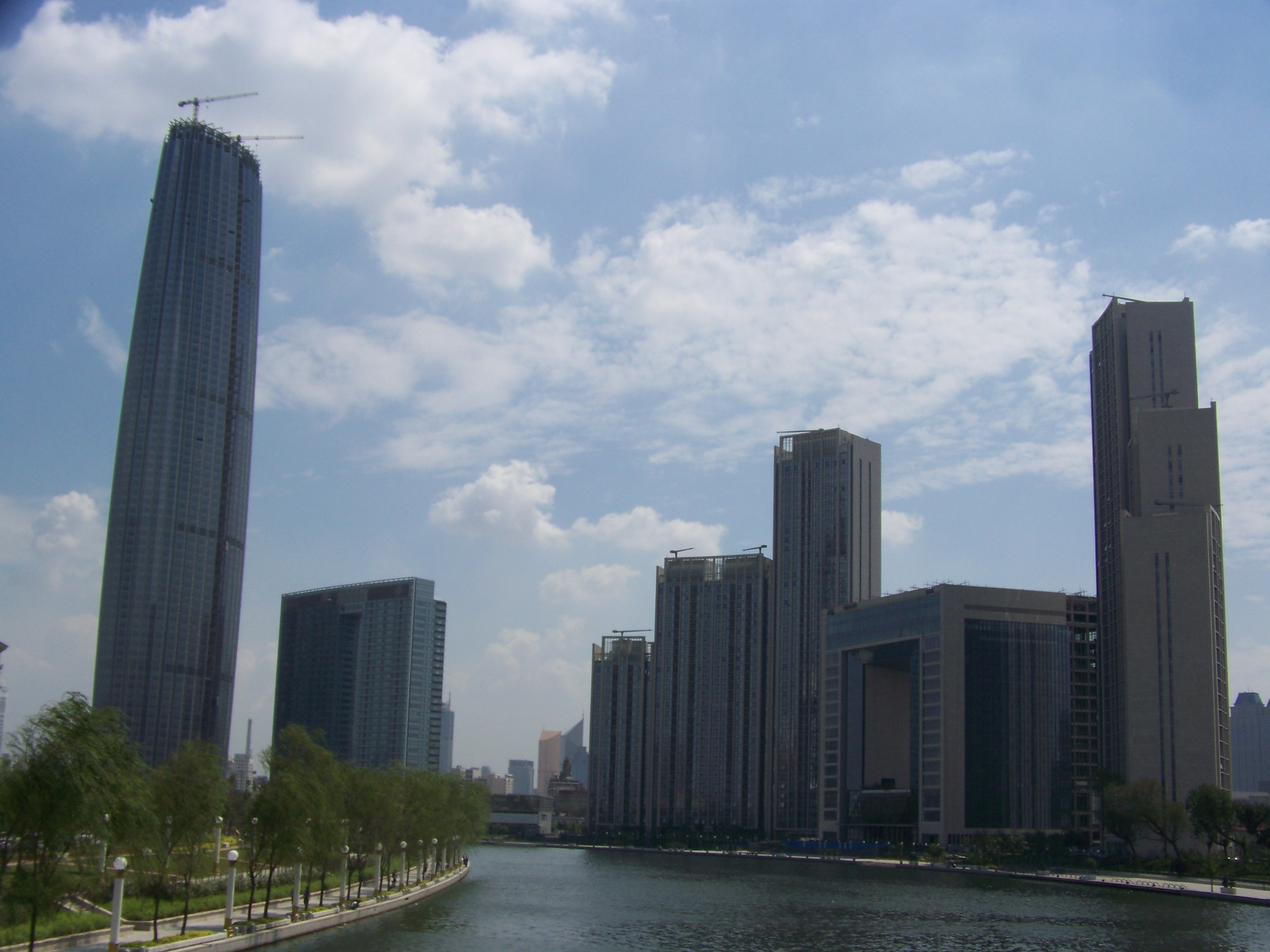 津塔津门